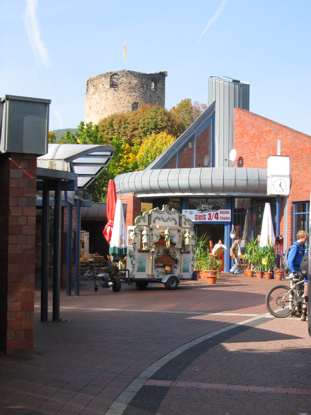 Hauptbahnhof Vorplatz von Boppard